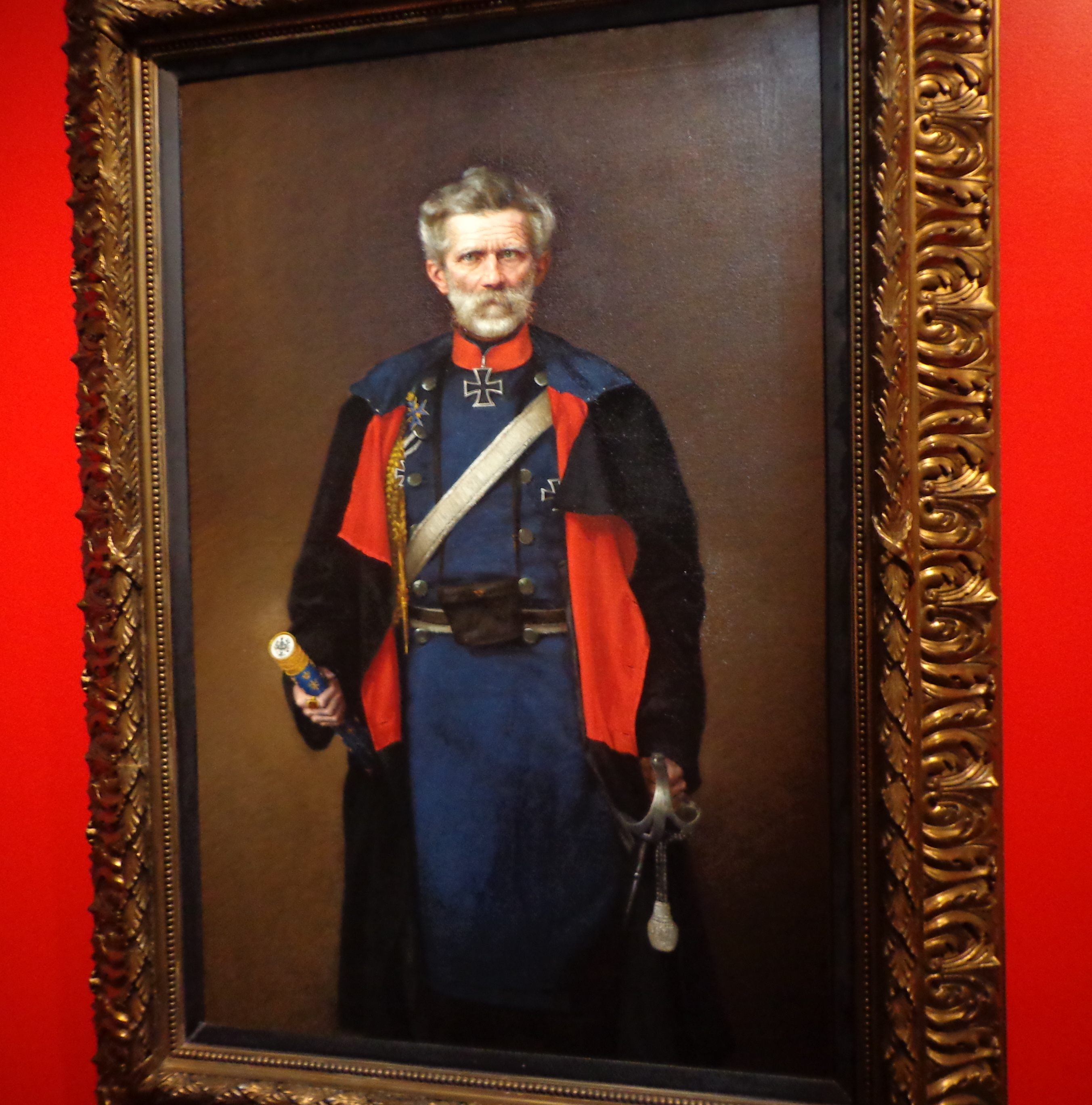 Tableau daté de 1883 au musée historique de Strasbourg